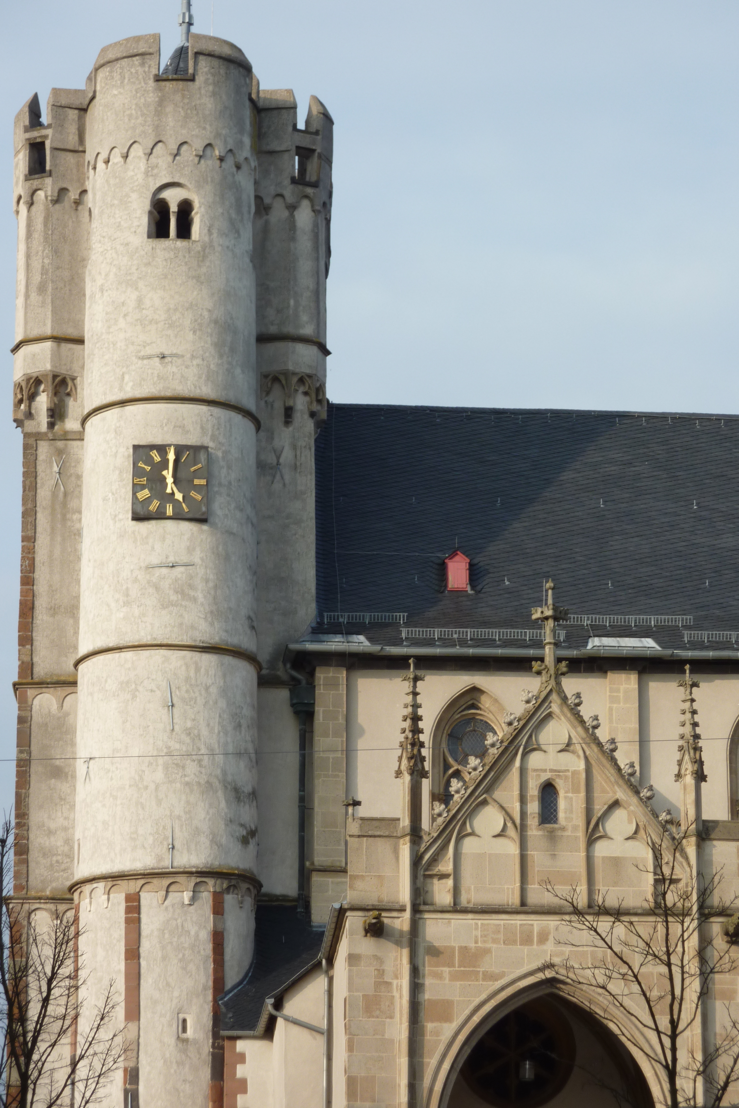 Turm der Stiftskirche Münstermaifeld